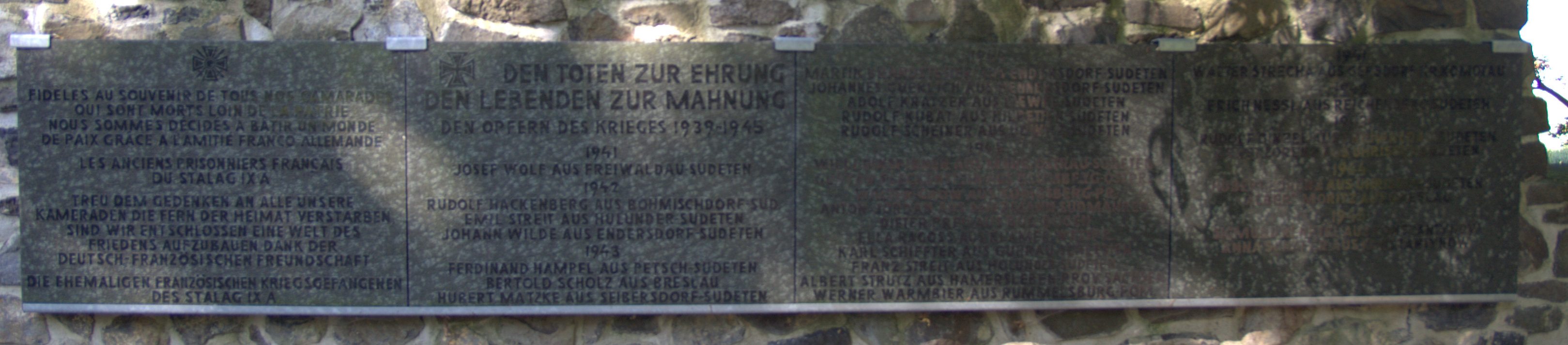 Die Platten zeigen Namen der verstorbenen französischen Kriegsgefangenen und Namen von Verstorbener der ersten Trutzhainer Familien.